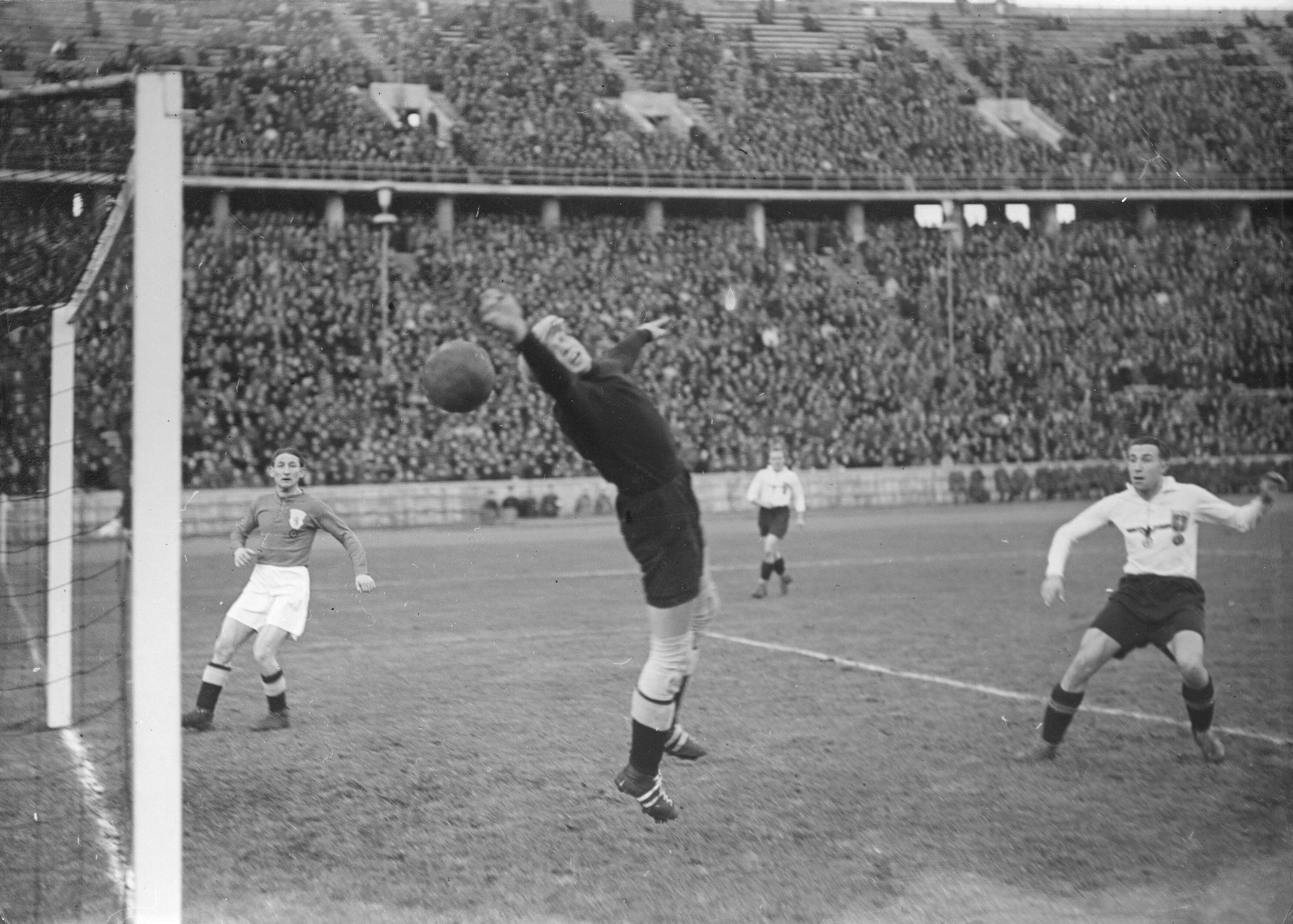 Mecz piłki nożnej pomiędzy drużynami Berlina i Wiednia w Berlinie. Piłkarz z Wiednia Kierbach (pierwszy z prawej) strzela bramkę berlińczykom. Nieudanie interweniuje bramkarz Helmut Jahn. Za bramkarzem z lewej piłkarz z Berlina Emil Krause, przed polem karnym piłkarz gości Decker.